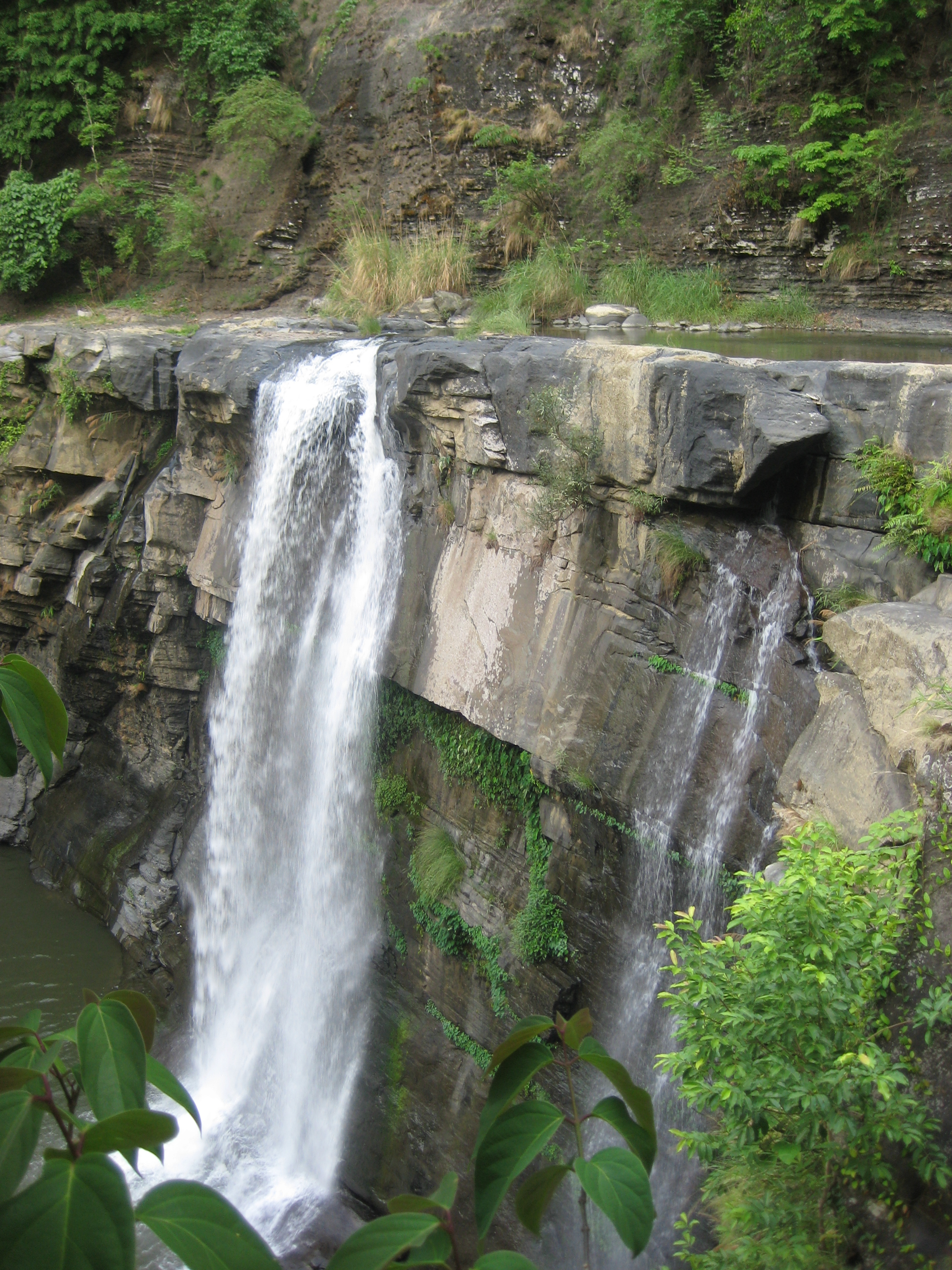 Kawpi Waterfall